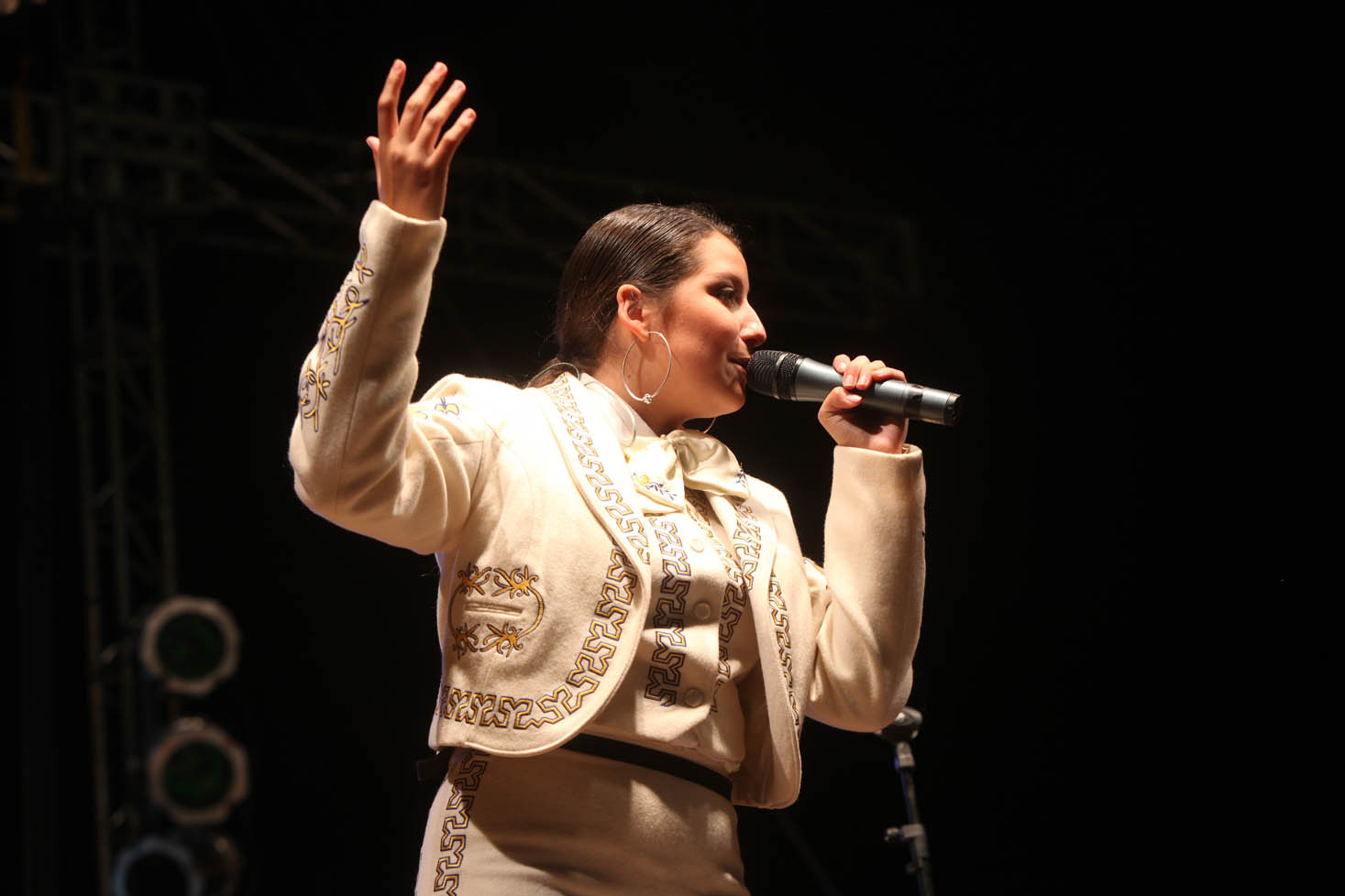 Cierre de campaña en Rancagua